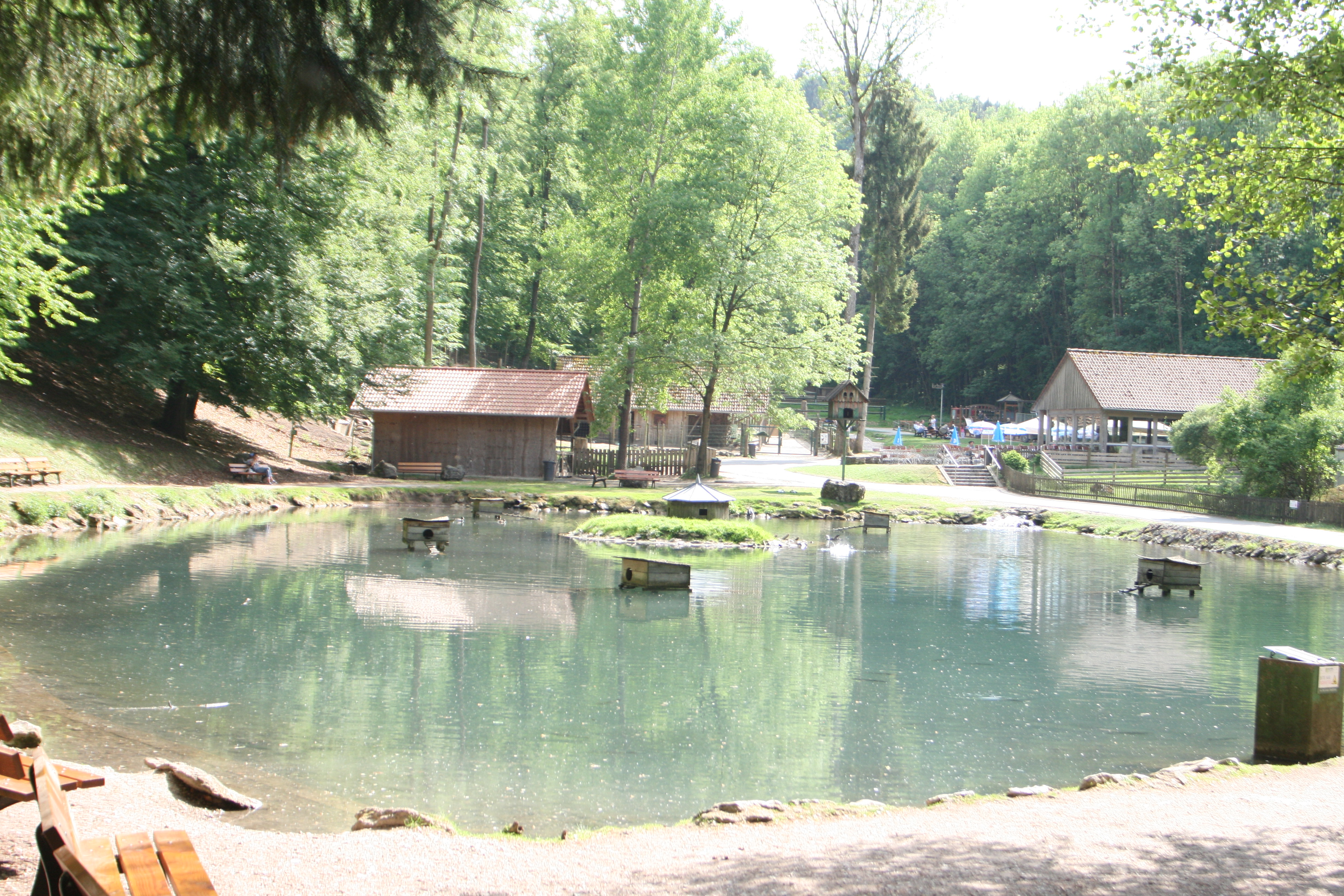 Großer Weiher im Wildpark Hundshaupten